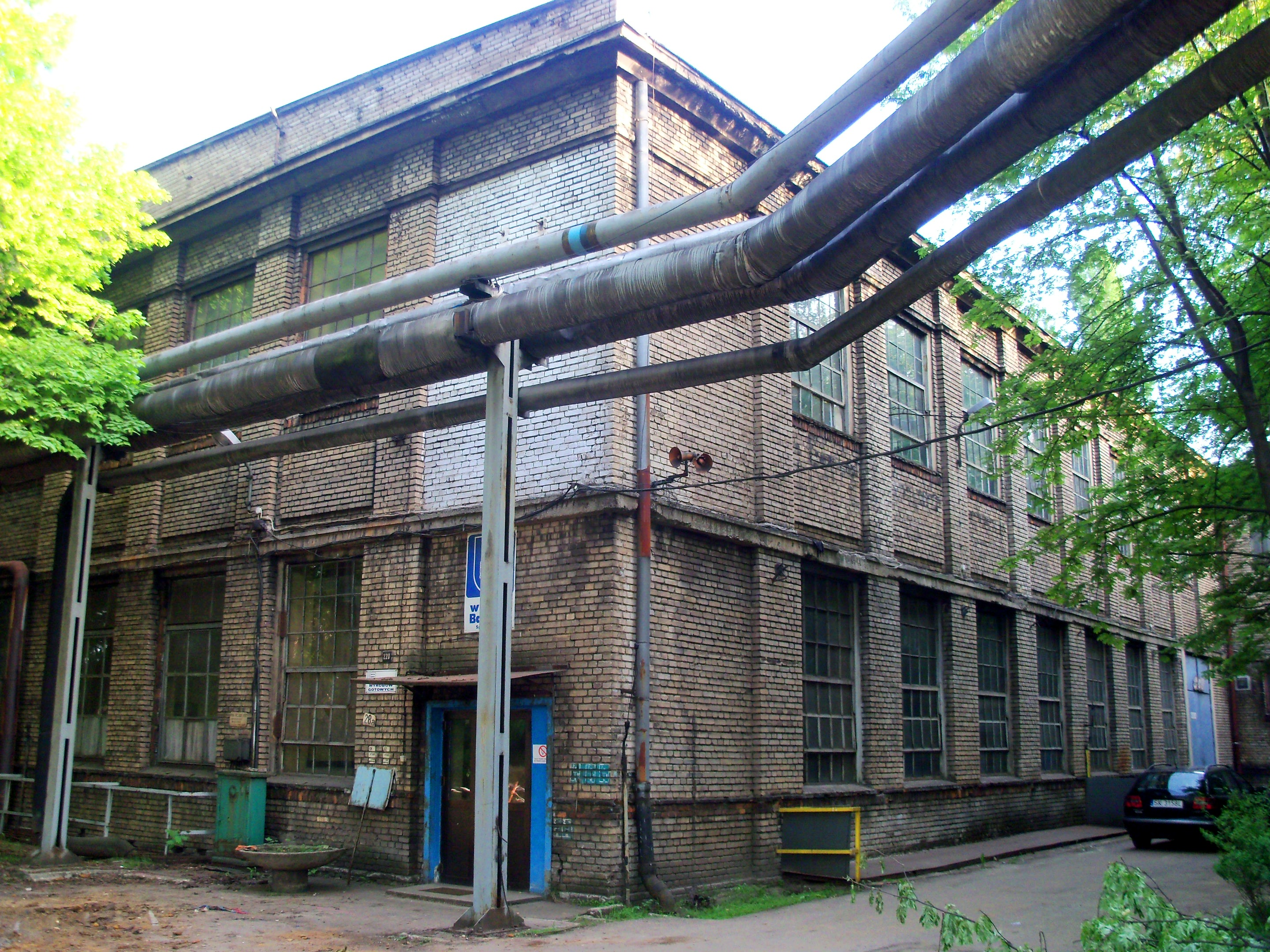 Huta Baildon w Katowicach